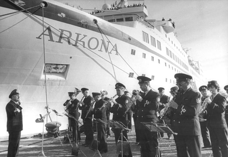 ADN-ZB Sindermann- 15.10.85 Rostock: MS "Arkona"- Auf der Pier des Passagierkais der "Arkona" spielt das Orchester der Deutfracht- Seereederei Rostock mit dem traditionellen Lied "Muß i denn, muß i denn ..." einen stimmungsvollen Abschied. Das Schiff lief zu seiner ersten Fahrt nach Leningrad und Riga aus.